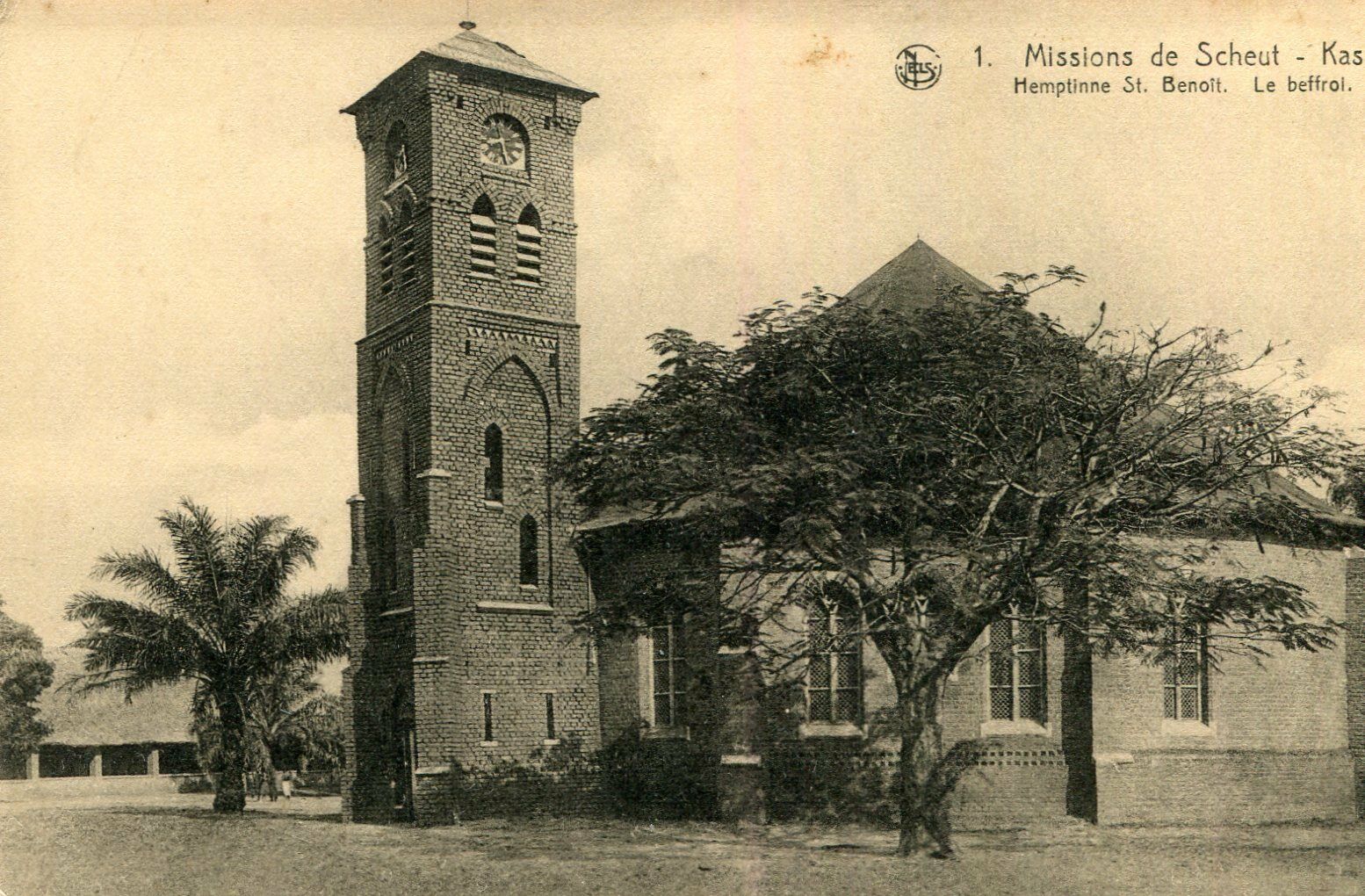 Mission scheutiste d'Hemptinne-Saint -Benoît au Congo belge vers 1925.